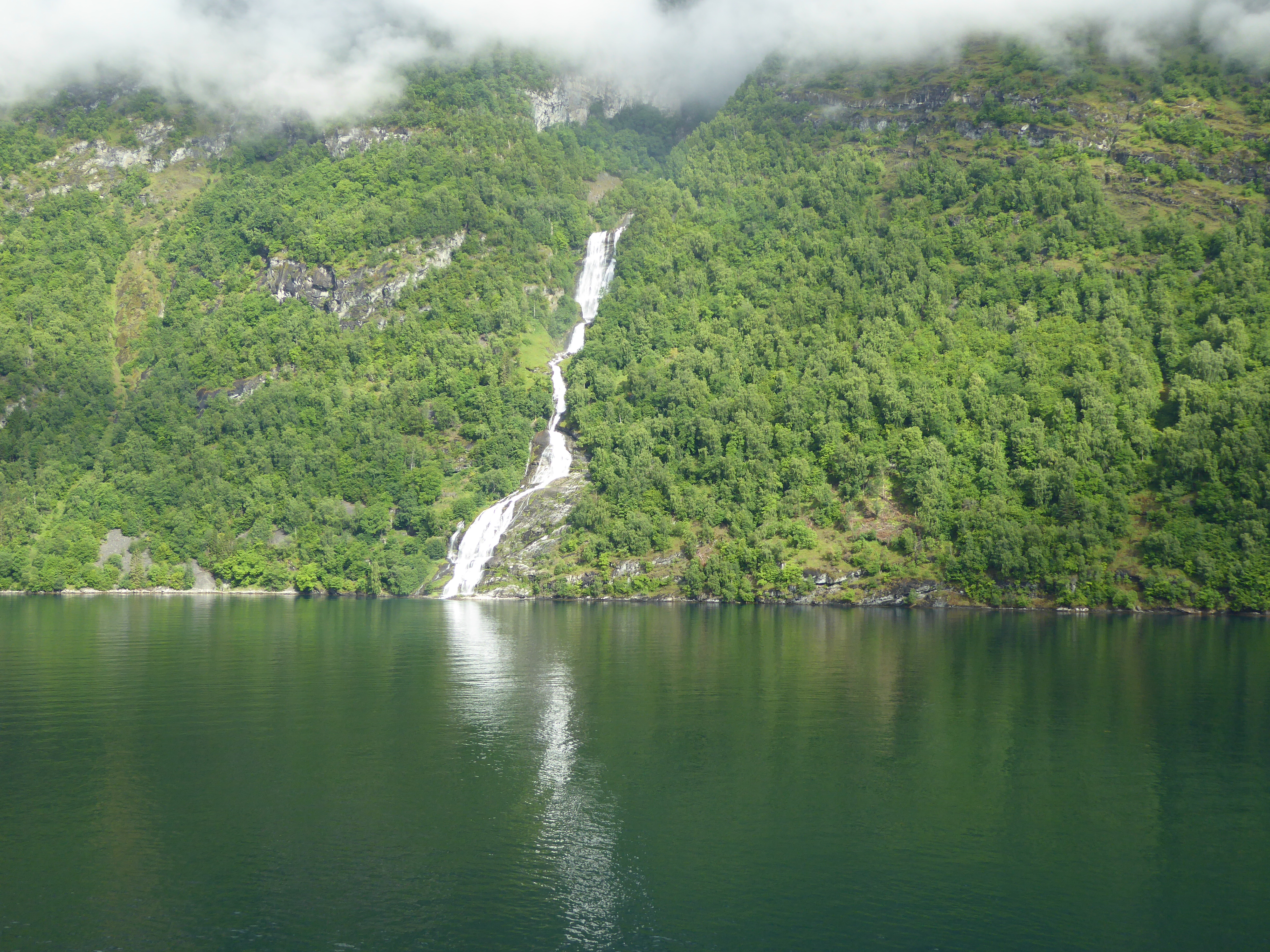 VV00002331